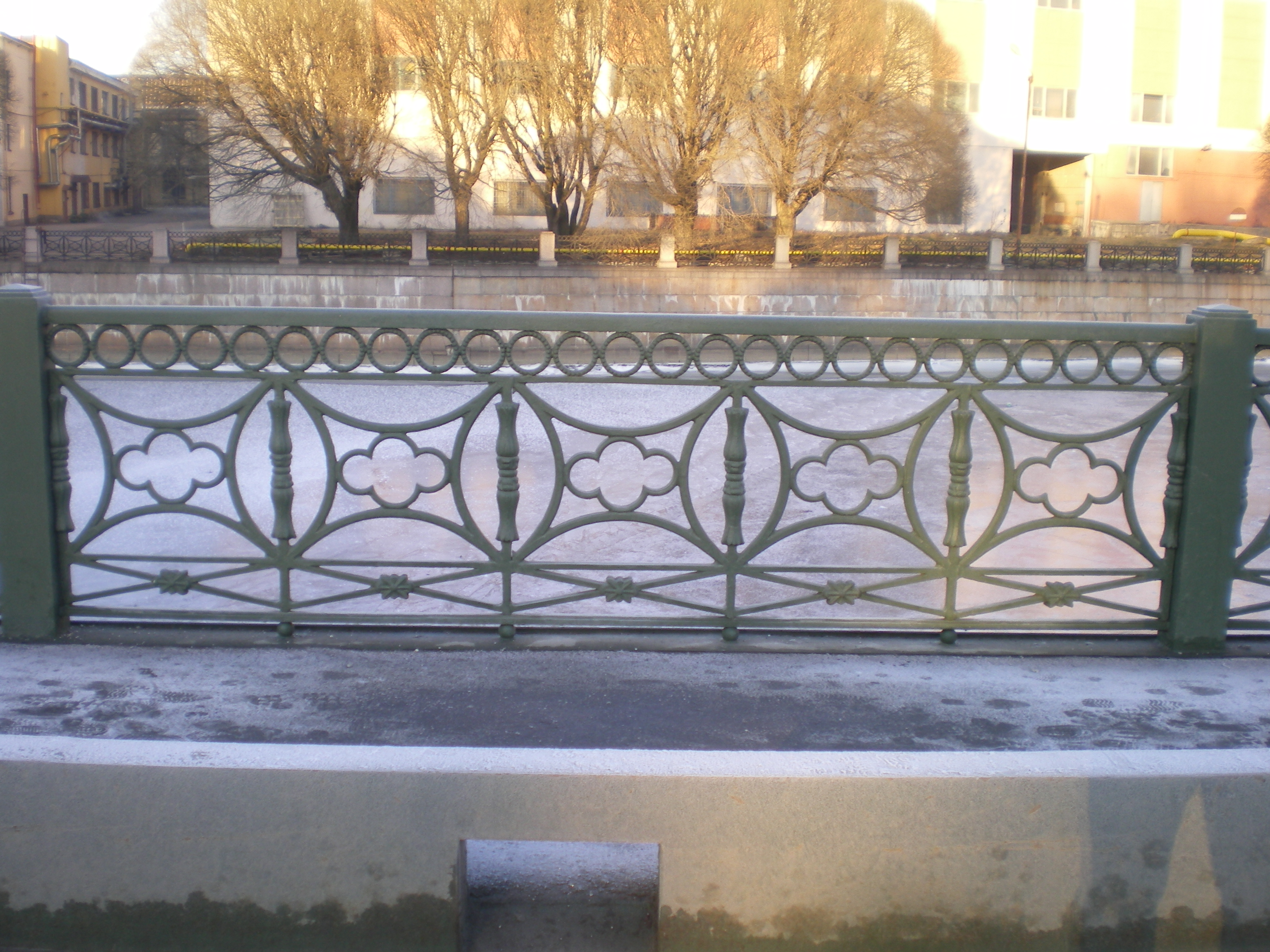 Решётка Матисова моста в Санкт-Петербурге